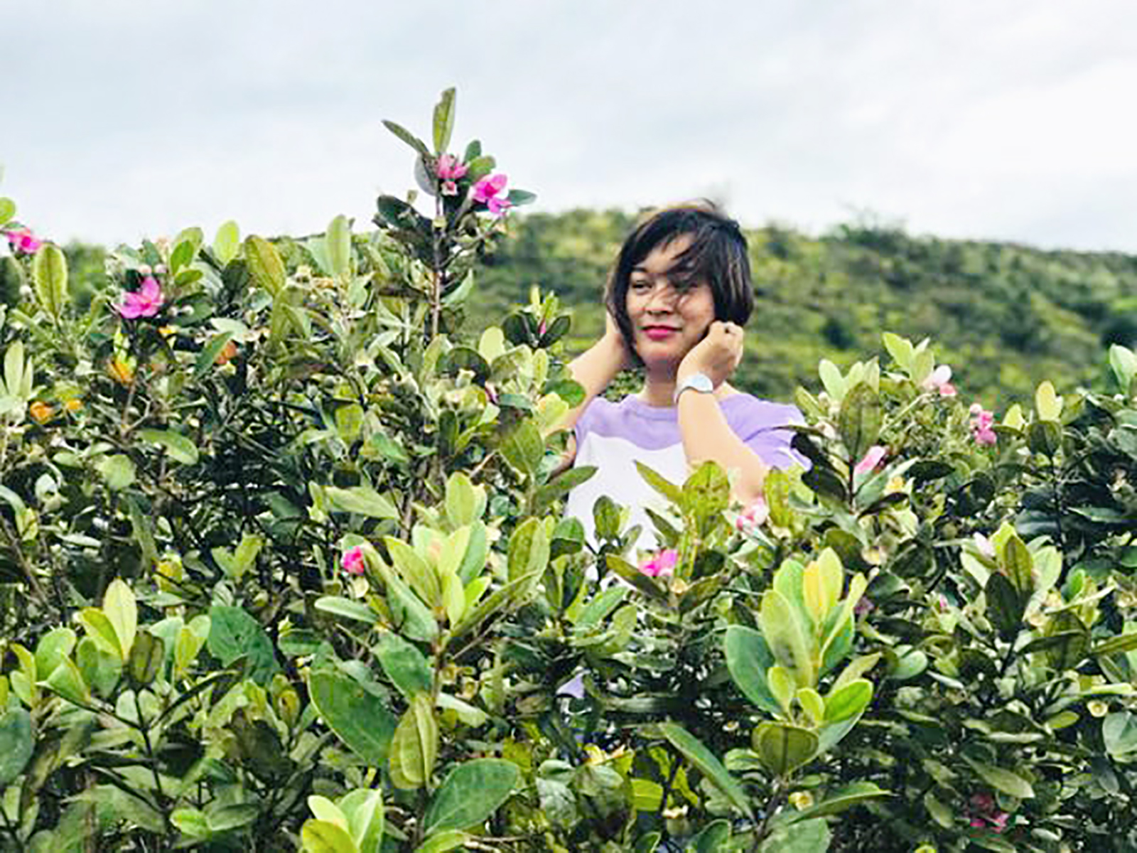 Ảnh sim sưu tầm